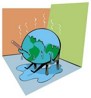 El cambio climático, provocado por la emisión de Gases de Efecto Invernadero (en adelante GEI) y en especial del CO2, es el azote de nuestro tiempo y existen evidencias considerables de que la mayor parte del calentamiento global ha sido causado por las actividades humanas. Hoy día, casi todas las actividades que realizamos (movilidad, alimentación, etc) y bienes que poseemos y utilizamos (bienes de consumo, hogar, etc) implican consumir energía, lo que significa contribuir a las emisiones a la atmósfera. Bajo este prisma, la HUELLA DE CARBONO, representa una medida para la contribución de las organizaciones a ser entidades socialmente responsables y un elemento más de concienciación para la asunción entre los ciudadanos de prácticas más sostenibles. Con esta iniciativa se pretende cuantificar la cantidad de emisiones de GEI, medidas en emisiones de CO2 equivalente, que son liberadas a la atmósfera debido a nuestras actividades cotidianas o a la comercialización de un producto. Este análisis abarca todas las actividades de su ciclo de vida (desde la adquisición de las materias primas hasta su gestión como residuo) permitiendo a los consumidores decidir qué alimentos comprar en base a la contaminación generada como resultado de los procesos por los que ha pasado. La medición de la huella de carbono de un producto crea verdaderos beneficios para las organizaciones. La huella de carbono identifica las fuentes de emisiones de GEI de un producto. Esto por lo tanto permite definir mejores objetivos, políticas de reducción de emisiones más efectivas e iniciativas de ahorros de costo mejor dirigidas, todo ello consecuencia de un mejor conocimiento de los puntos críticos para la reducción de emisiones, que pueden o no pueden ser de responsabilidad directa de la organización.